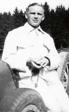 Čeněk Junek (1894 - 1928), Československý automobilový závodník.